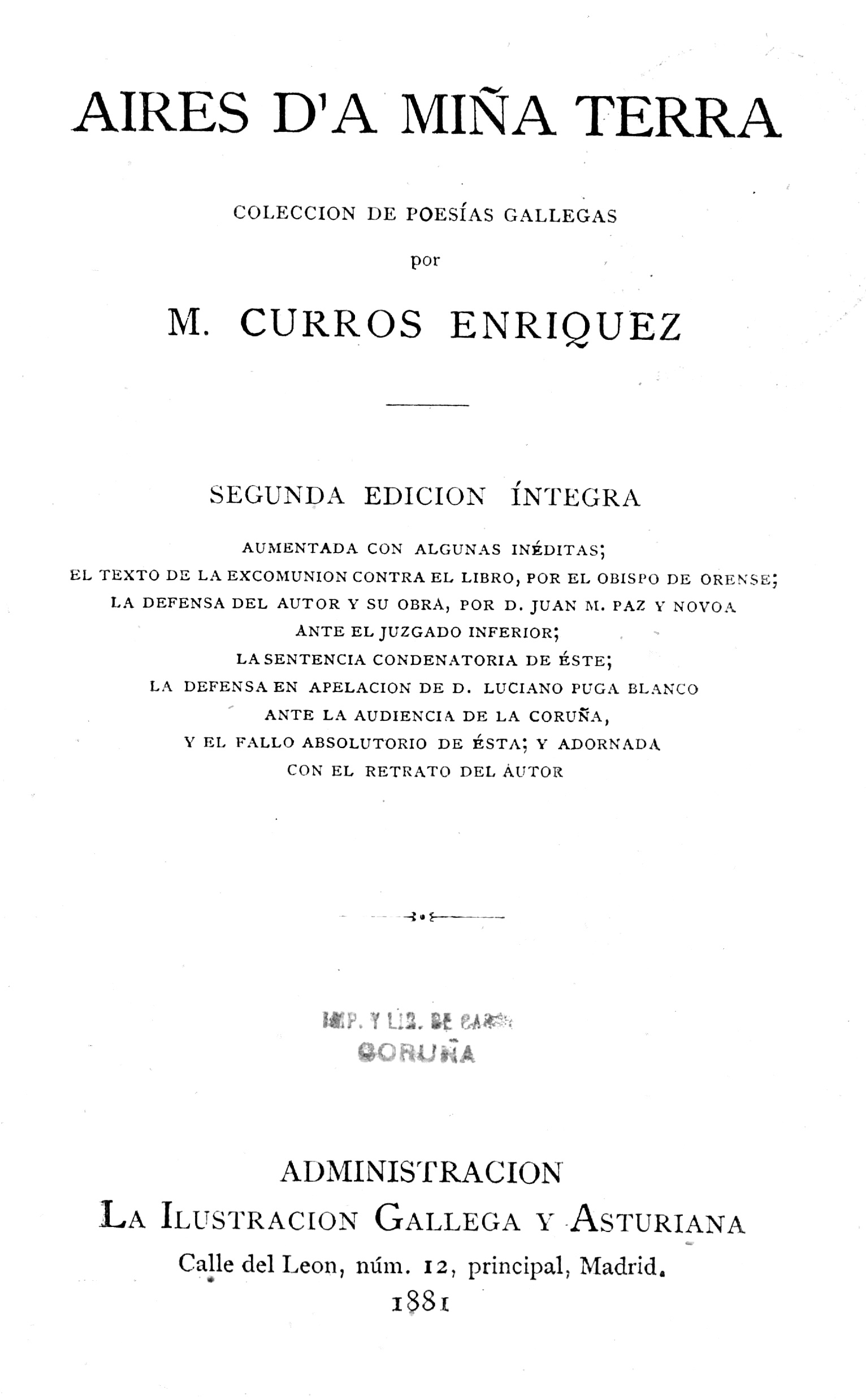 Aires d'a miña terra. 2ª edición. [1]